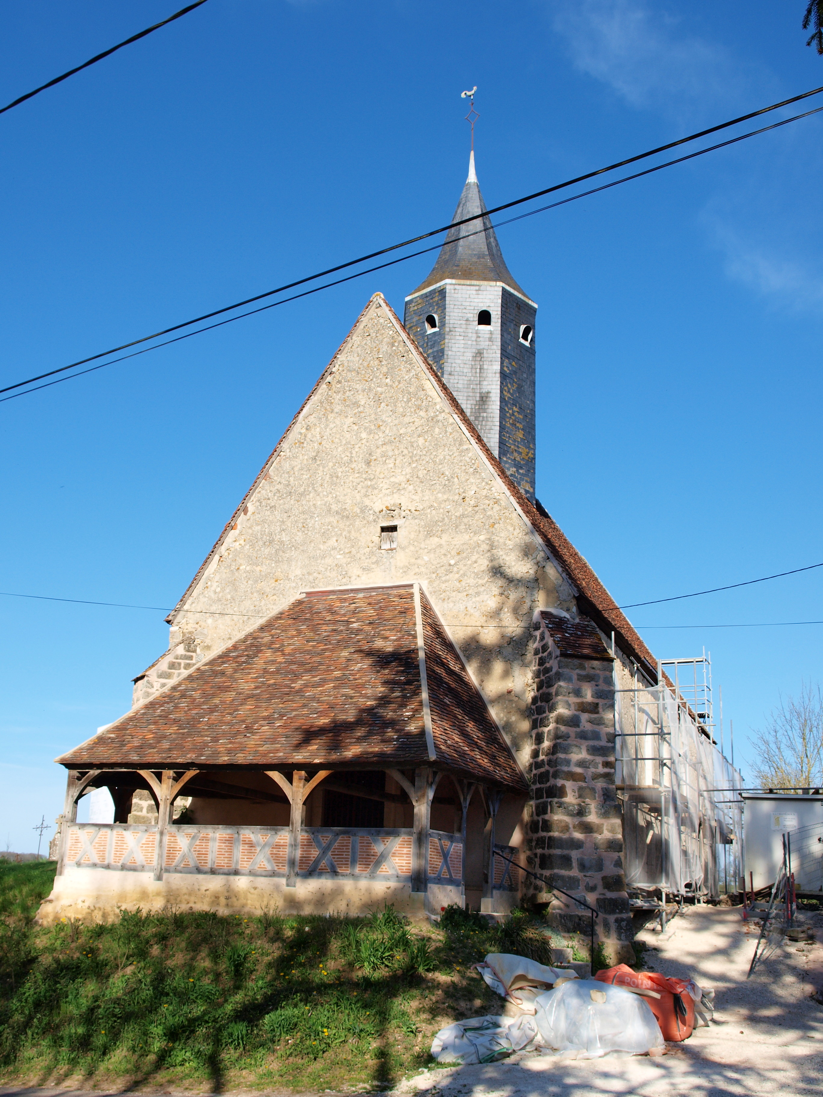 Église Saint-Romain de Saint-Romain-le-Preux (Yonne, France) ; alors en chantier de rénovation.